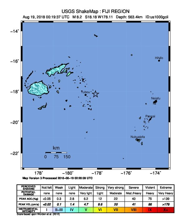 美国地质调查局发布的2018年斐济地震等烈度线图。